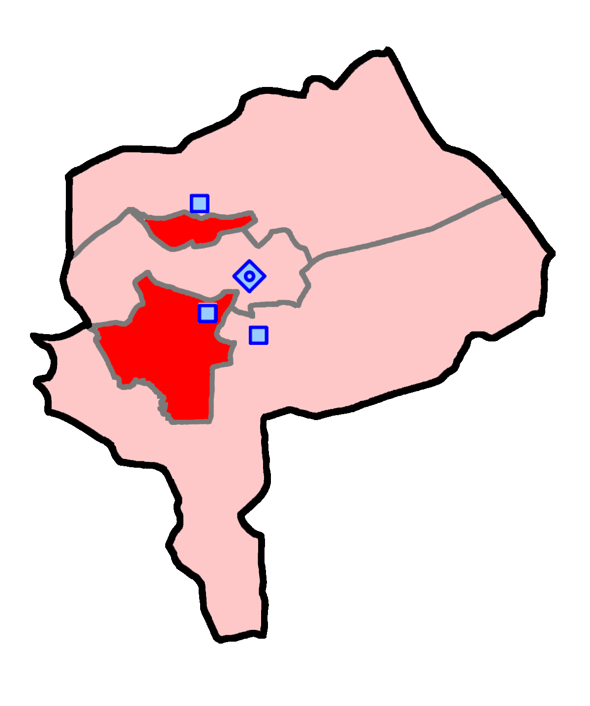 حوزهٔ انتخاباتی تفت و میبد برای انتخابات مجلس شورای اسلامی